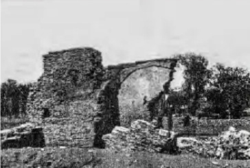 Фундаментальні руїни однієї із турецьких лазень існували в Татарбунарах до початку ХХ століття, а збереглися вони так довго тому, що в першій половині ХІХ століття місцеві мешканці переобладнали цю лазню у водяний млин.